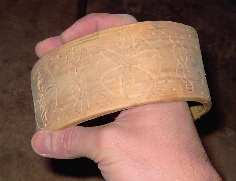 Una Canaula o Canabla del Alto Aragón en detalle. Se observan los motivos ornamentales grabados sobre ella.